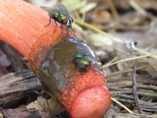 Mutinus elegans (Mont.) Fisch.